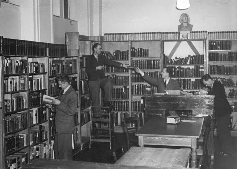 Akademie der Wissenschaften, Bibliothek Die Geisteswissenschaftliche Abteilung der Deutschen Akademie der Wissenschaften arbeitet an der Fertigstellung des Grimm'schen Wörterbuches. s.Begleittext UBz: Blick in die Bibliothek der Abteilung Grimm Wörterbuch. Zentralbild-Schack 5.2.52 Leihweise Zentral Bild